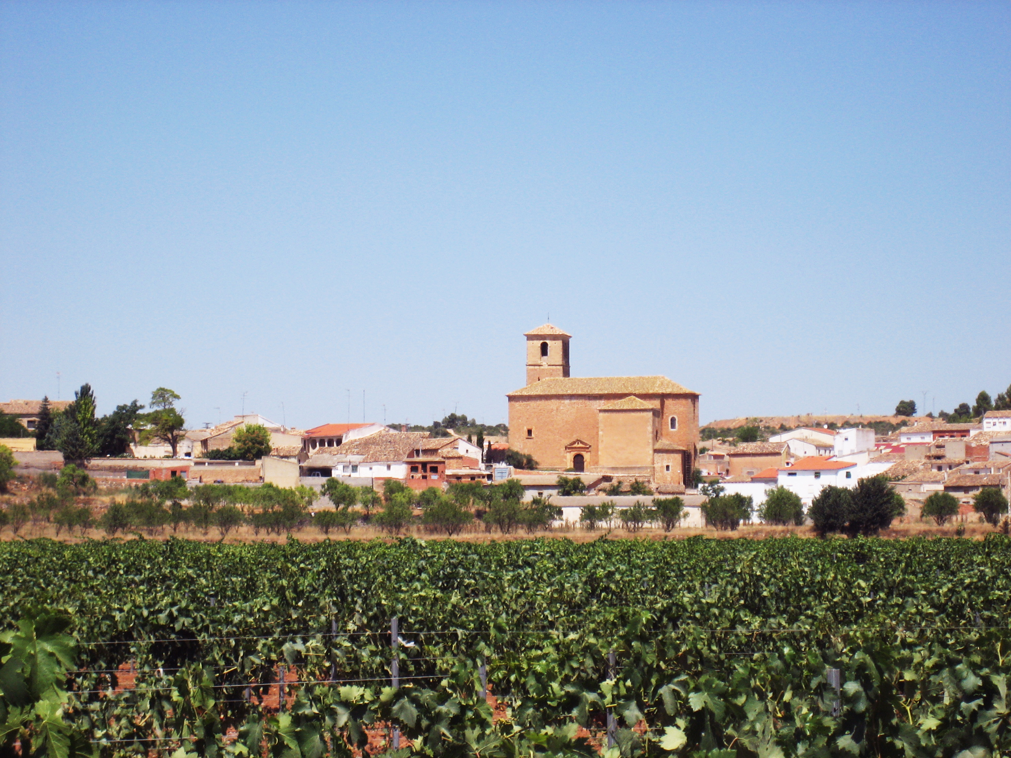 Vista sur de Puebla del Salvador